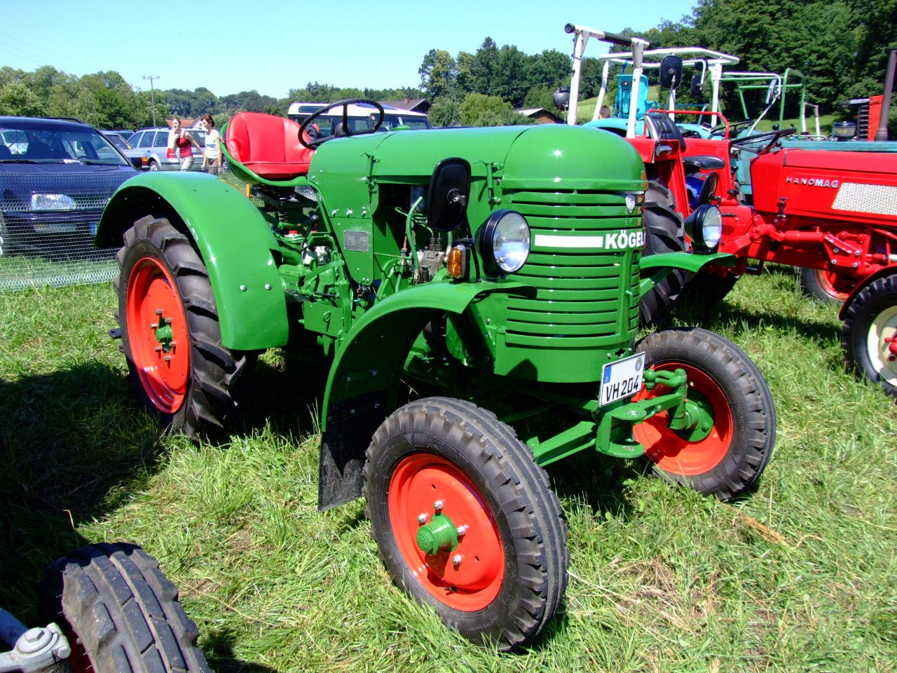 Kögel K25-HH mit 22 PS, Baujahr 1950, Hubraum: 1590 ccm, zul. Achsdruck vorn: 470 kg, zul. Achsdruck hinten: 930 kg, zul. Gesamtgewicht: 1400 kg, Leergewicht: 1190 kg